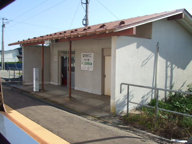 中小国駅 ホームと駅舎